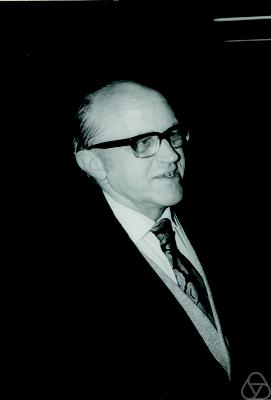 Foto di Werner Burau